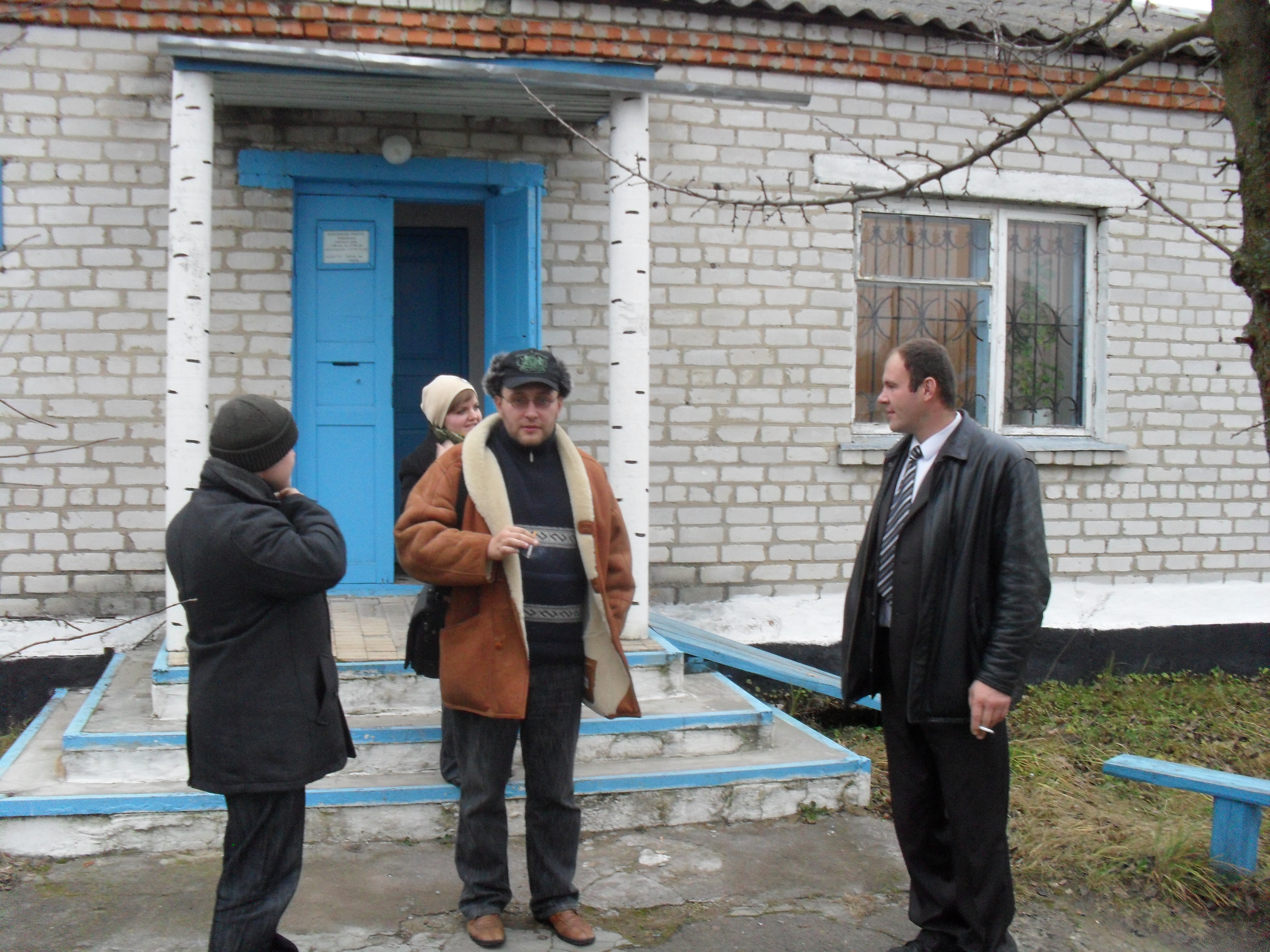 Зустріч Вікіпедистів з головою Ходаківської сільської ради Петром Миколайовичем Потопальським